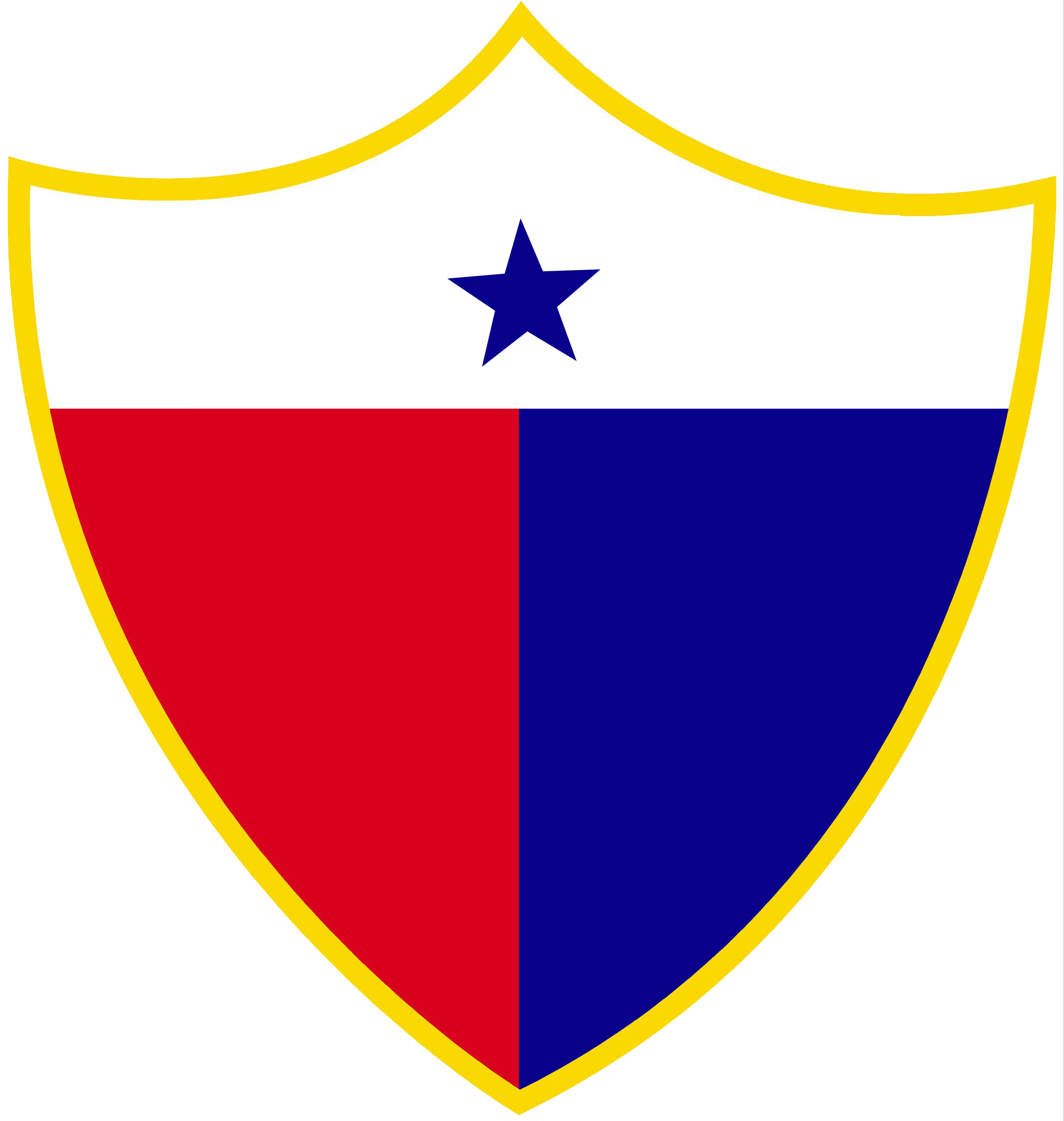 Ministerio de la Defensa Nacional Guatemala